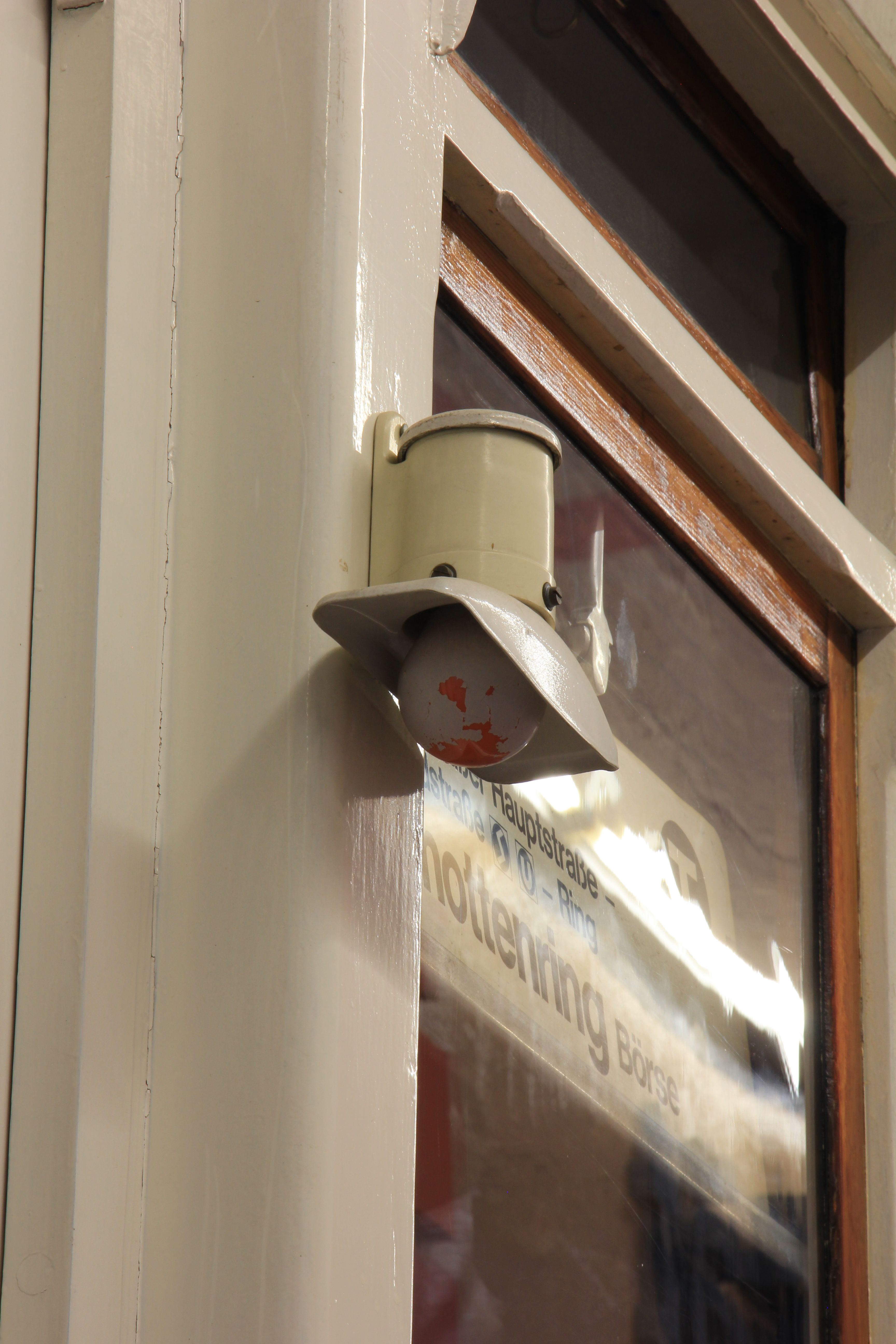 Museumsdepot des Wiener Tramwaymuseums in Traiskirchen Dieses Bild wurde anlässlich des österreichischen Tags des Denkmals 2016 in Niederösterreich eingereicht.